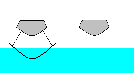 Foils PNG (Original creation) 左：半浸水翼具自我穏定能力。當水翼向下沉，浸在水中的面積增加，升力亦增加，把水翼向上抬。反之亦然。故此水翼能自我維持在水面的位置。 右：全浸水翼，升力跟水翼在水中的深淺位置無直接關係，不具自我穏定能力。 On the left: Surface-piercing hydrofoil. On the right: fully submerged hydrofoil. Surface-piercing hydrofoil is self-stabilizing: when the hydrofoil gets deeper into the water, more hydrofoil area is under water, lift is increased and the hydrofoil moves upward. Fully submerged hydrofoil is not self-stabilized. It has no idea where it is with respect to the water surface.